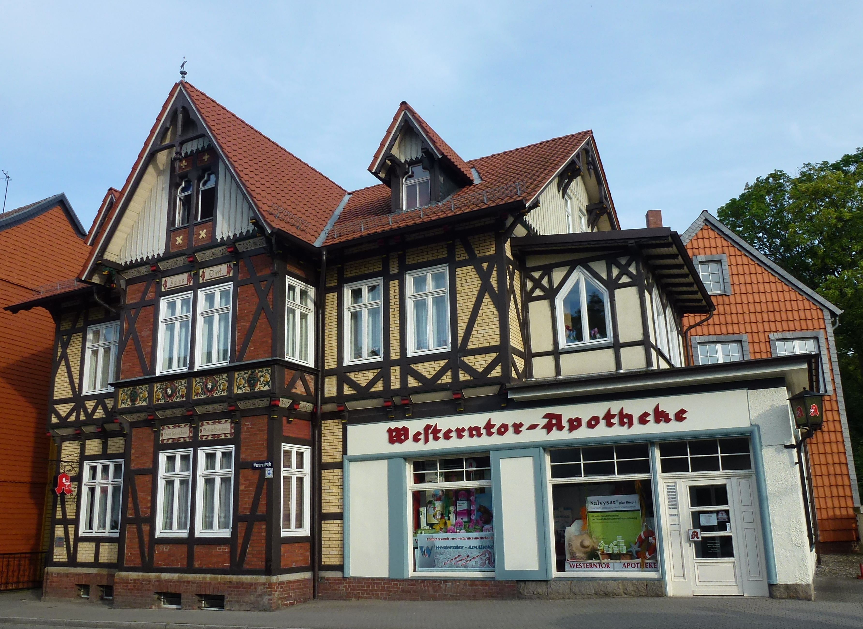 Apotheke Westernstraße 37 in Wernigerode